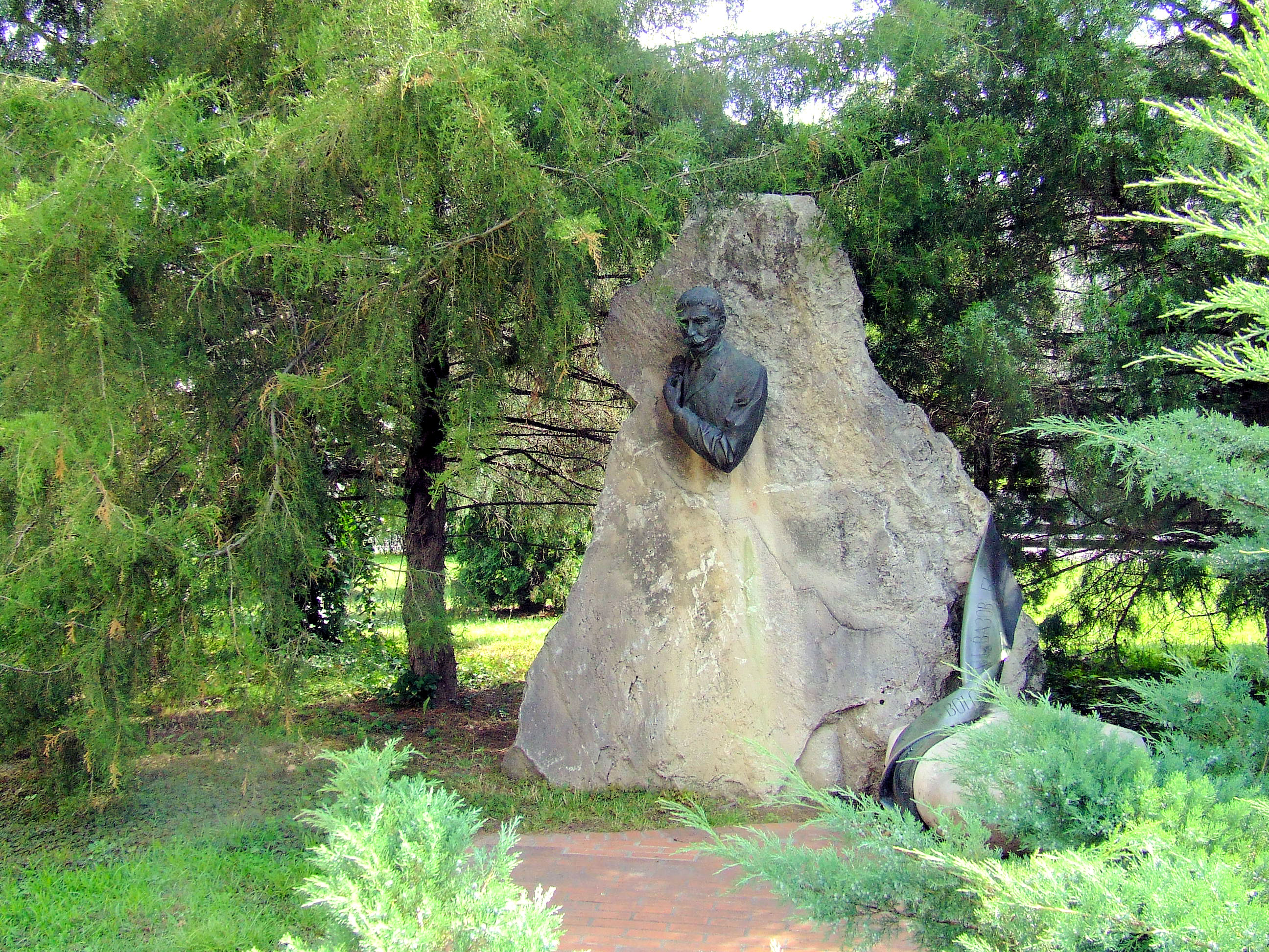 Ivan Vazov by Gábor Veres in Kiskőrös, Petőfi Sándor Sculpture Park. 1983 Bronze bust. Ivan Vazov (1850–1921) Petőfi Sándor művei egyik bolgár fordítójának mellszobra Kiskőrösön, a Petőfi Sándor Műfordítói szoborparkban. Veres Gábor alkotása (1983)[1]